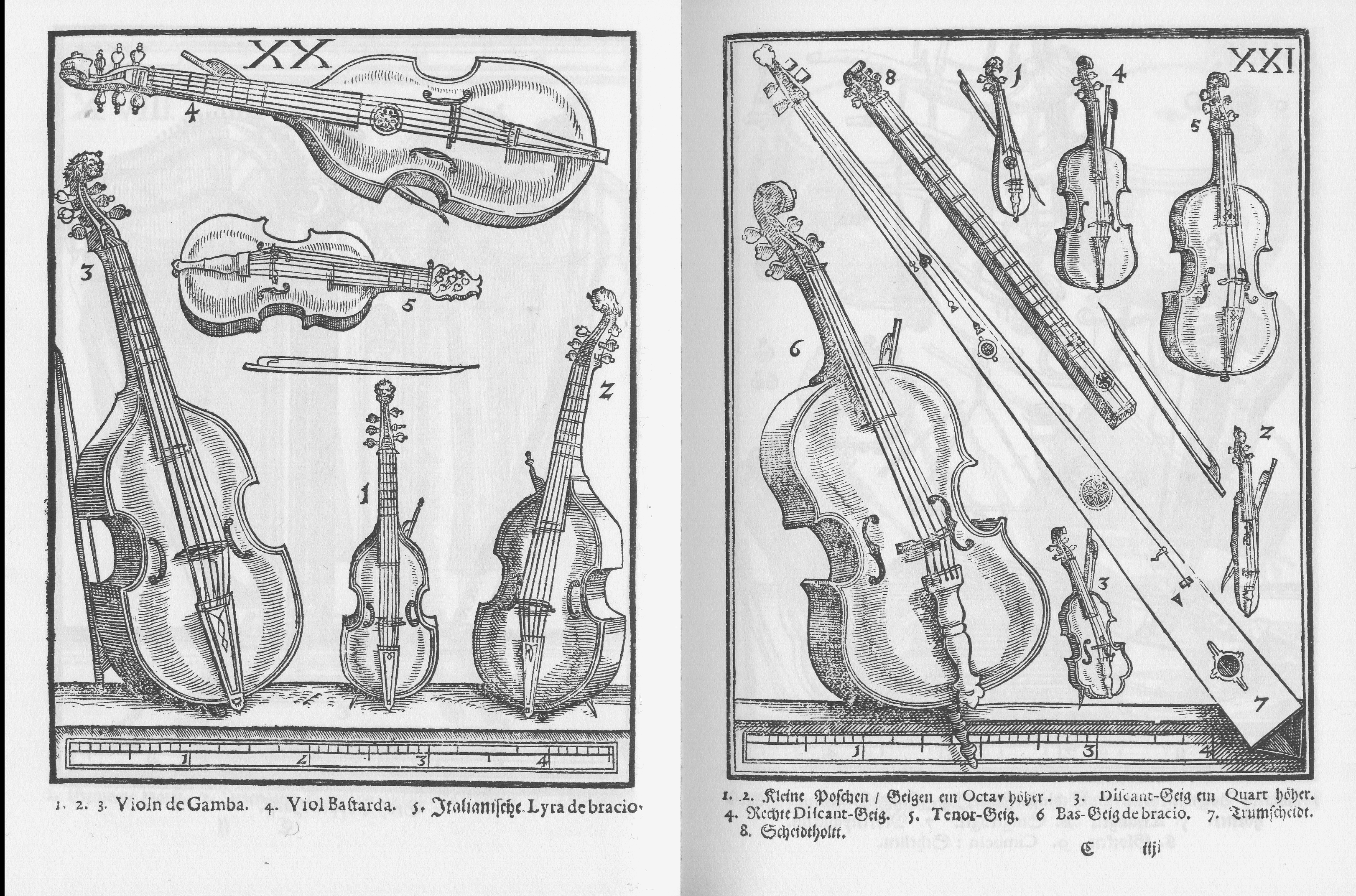 Syntagma Musicum Theatrum Instrumentorum seu Sciagraphia Wolfenbüttel 1620